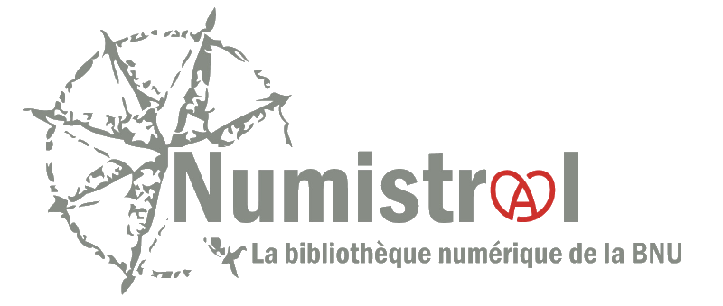 Ancien logo de Numistral, la bibliothèque numérique patrimoniale de la Bibliothèque nationale et universitaire de Strasbourg